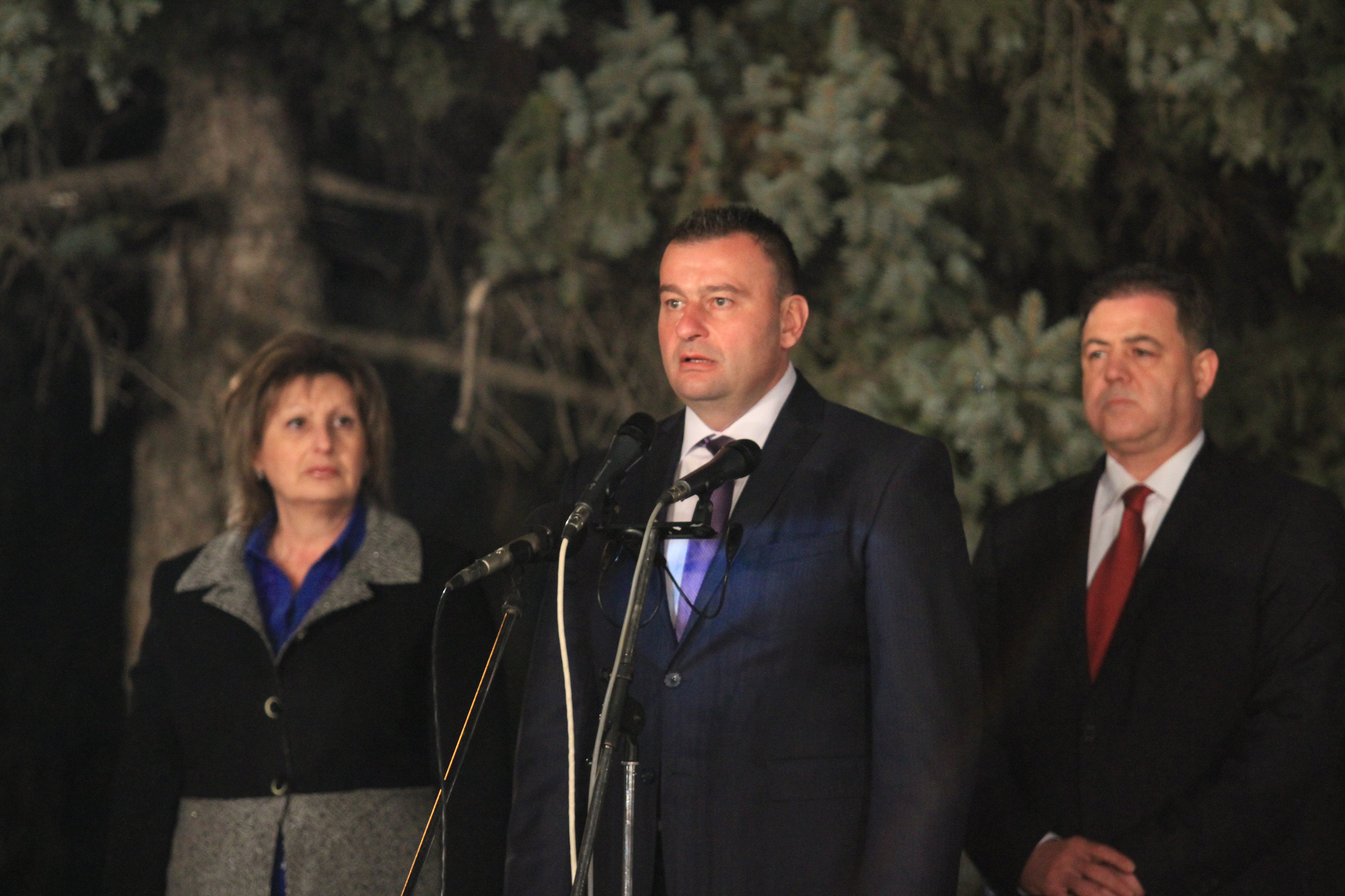 Кметът на Община Сливница и министърът на отбраната Н. Ненчев, Сливница 2015 г.